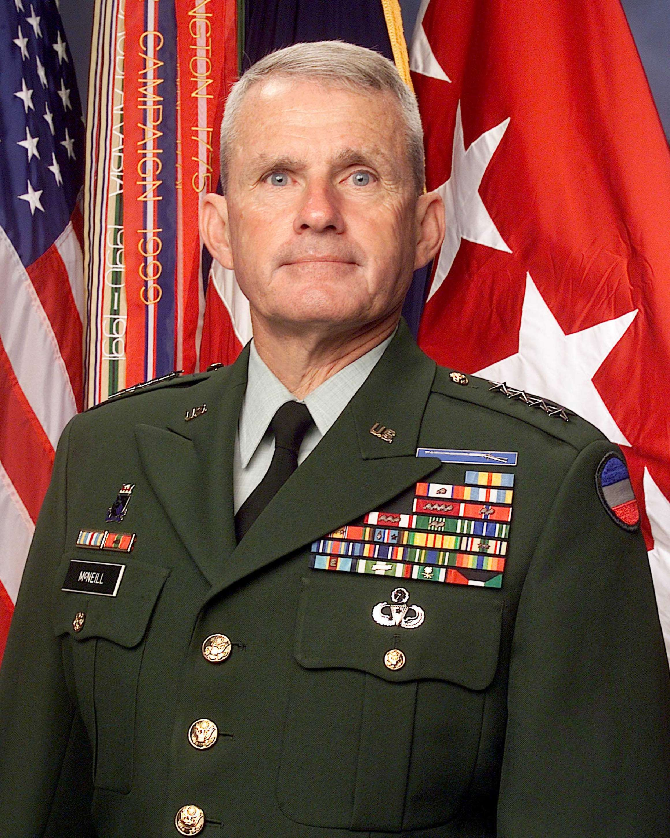 General Dan K. McNeill, Commander ISAF